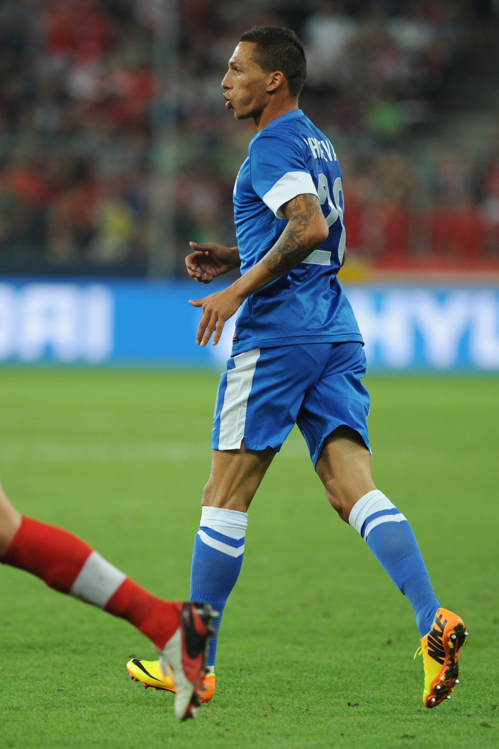 Freundschaftliches Länderspiel Österreich - Griechenland am 14. August 2013 in Salzburg: Jose Holebas